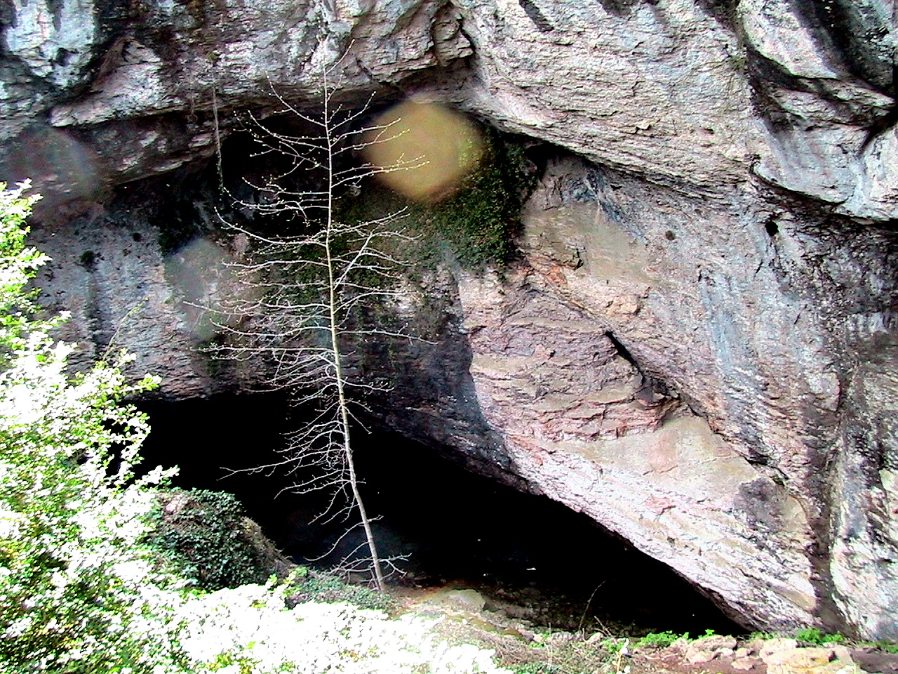 Forat del Gel, a l'obaga del Montsec de Rúbies (Llimiana - Pallars Jussà)